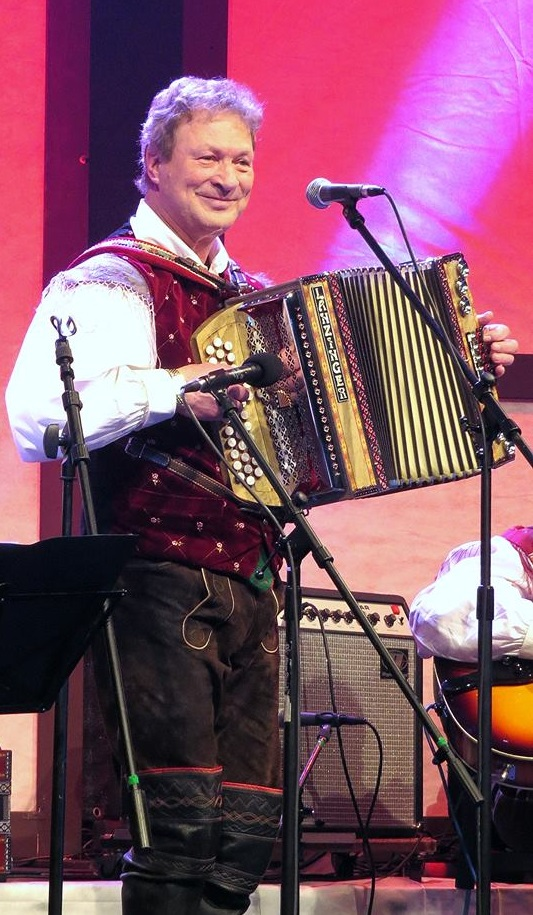 Franc Mihelič na koncertu Ansambla Banovšek v Oplotnici.